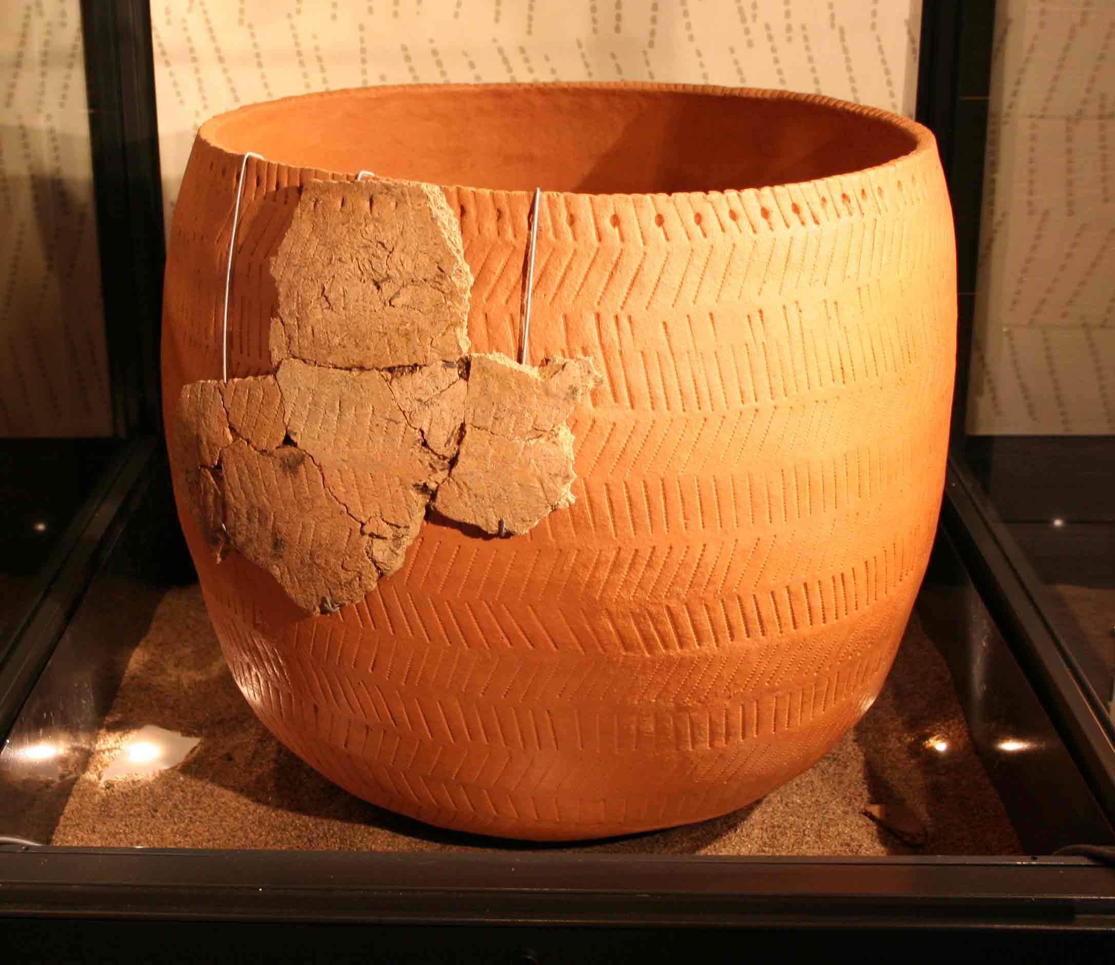 kierikinkeraaminen astia, päällä alkuperäisiä kappaleita